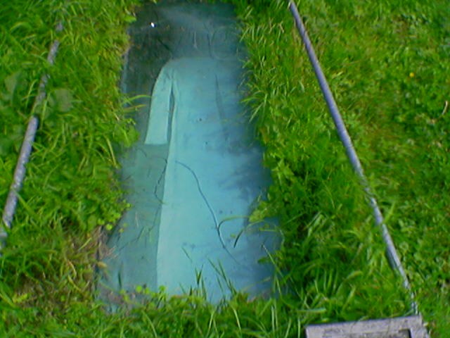 Position: 52° 40' 4.1" N, 010° 38' 28.2" O, "Ophelia" von der Künstlerin Anne Heusel